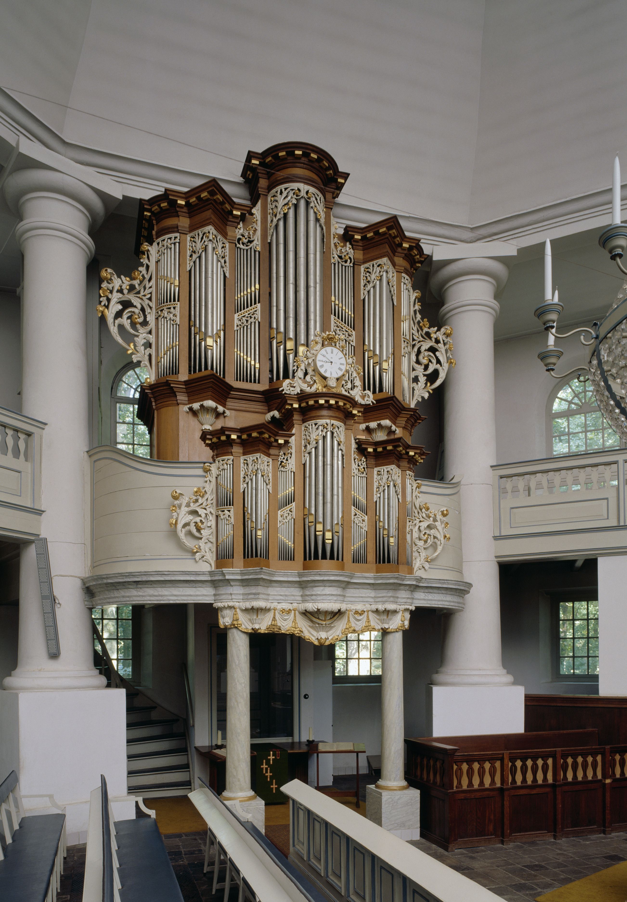 Nederlands Hervormde Kerk: Interieur, aanzicht orgel, orgelnummer 1547 (opmerking: Gefotografeerd voor Het Historische Orgel in Nederland 1819-1840, bladzijde 99)